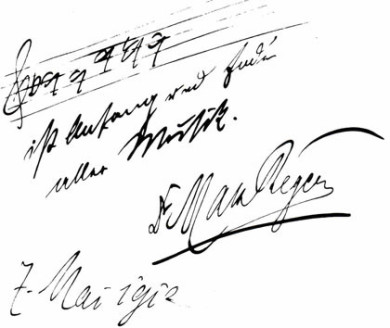 "b-a-c-h ist Anfang und Ende aller Musik". Autograph Max Reger, datiert 7. Mai 1912